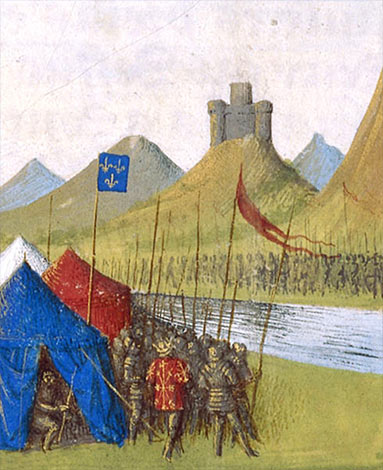 Campagne de Louis X le Hutin en Flandre